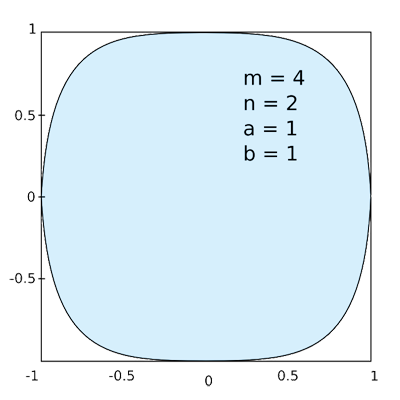 Example of a superellipse.